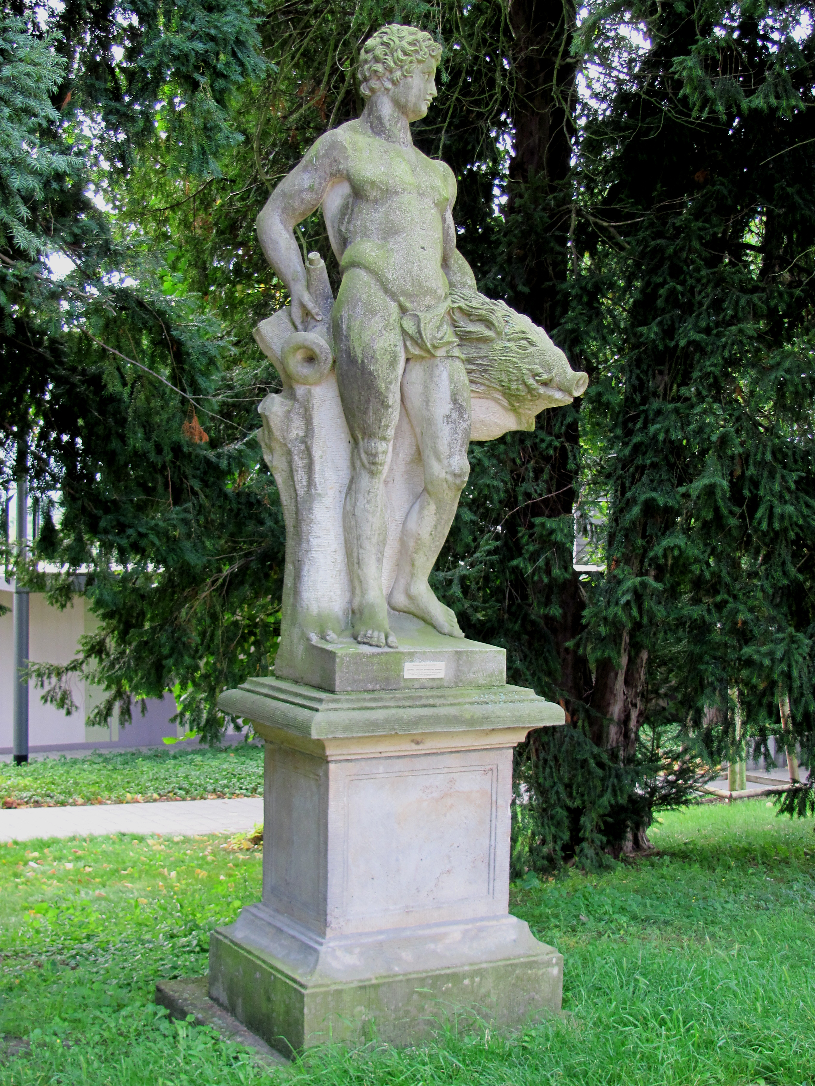 Kopien von sieben Barockskulpturen im Schwedter Schloßpark Original um 1770 von Carl Philipp Glume Ausf. 1974-78 durch Bildhauergemeinschaft Elbenaturstein, Dresden Denkmalliste Schwedt, Nr. 17